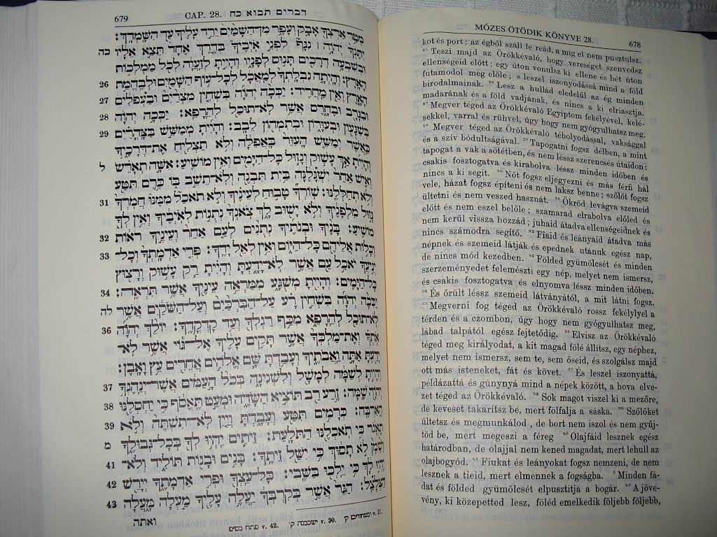 A héber–magyar Biblia reprint kiadásának egyik oldalpárja, eredeti kiadó: Izraelita Magyar Irodalmi Társulat (1898–1907)